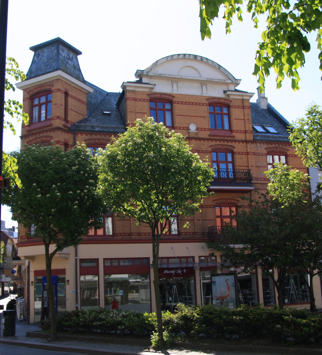 Mauritzengården